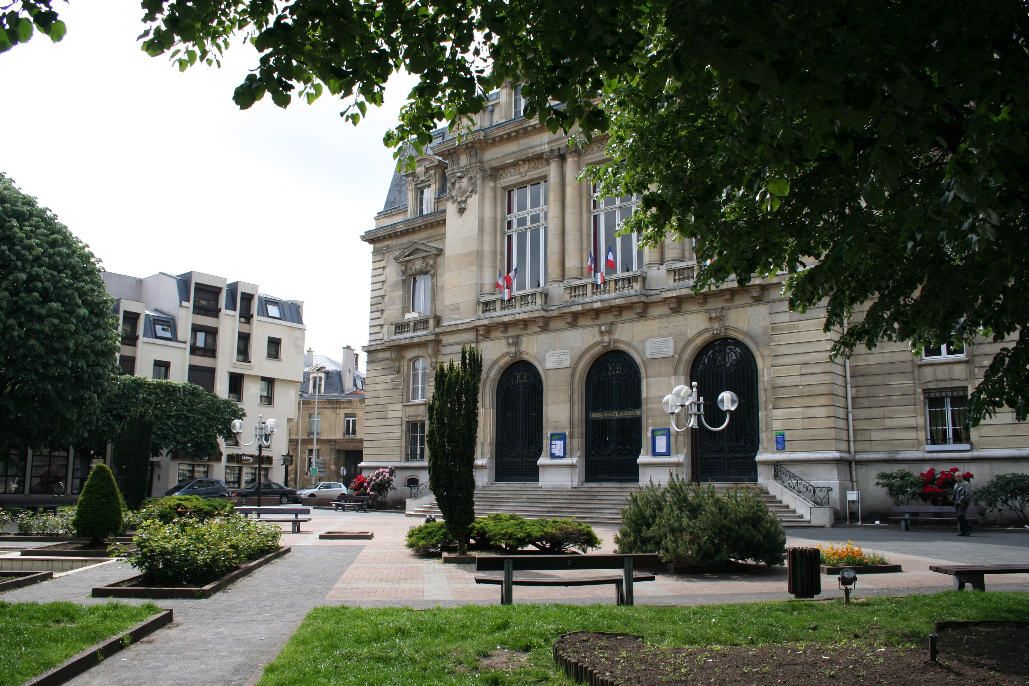 Mairie (avec jardin) du Kremlin-Bicêtre (94), France.